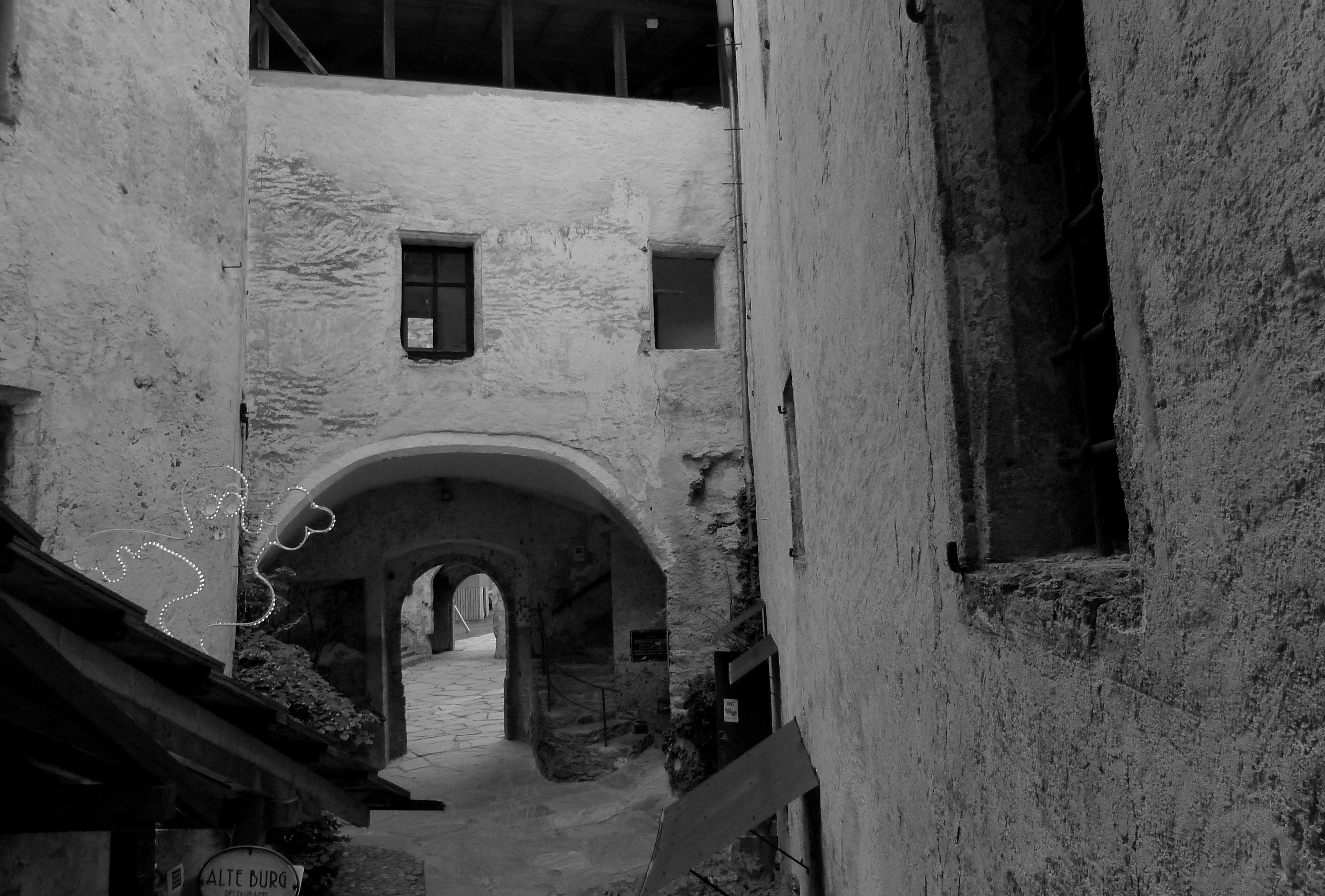 Burgruine Alte Burg,Innenhof